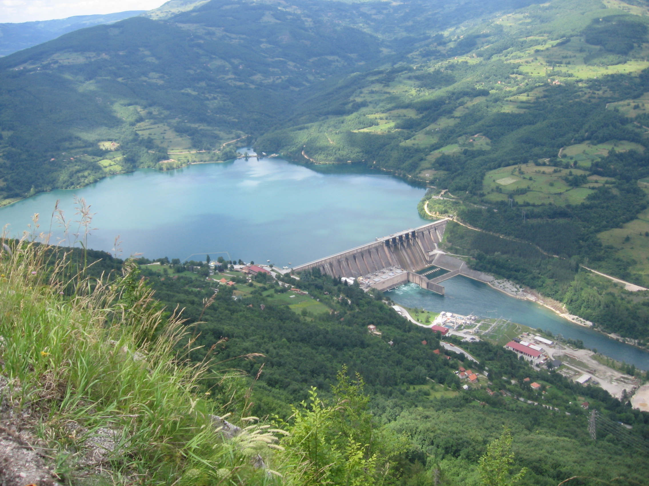 НП03 - Хидроцентрала Бајина Башта